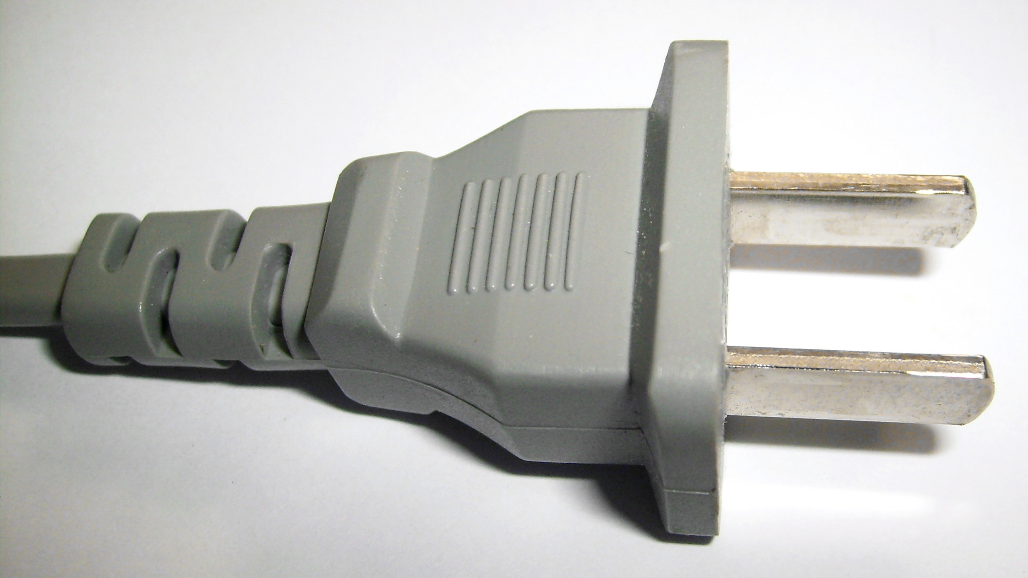 Bild von einem Stecker vom Typ A